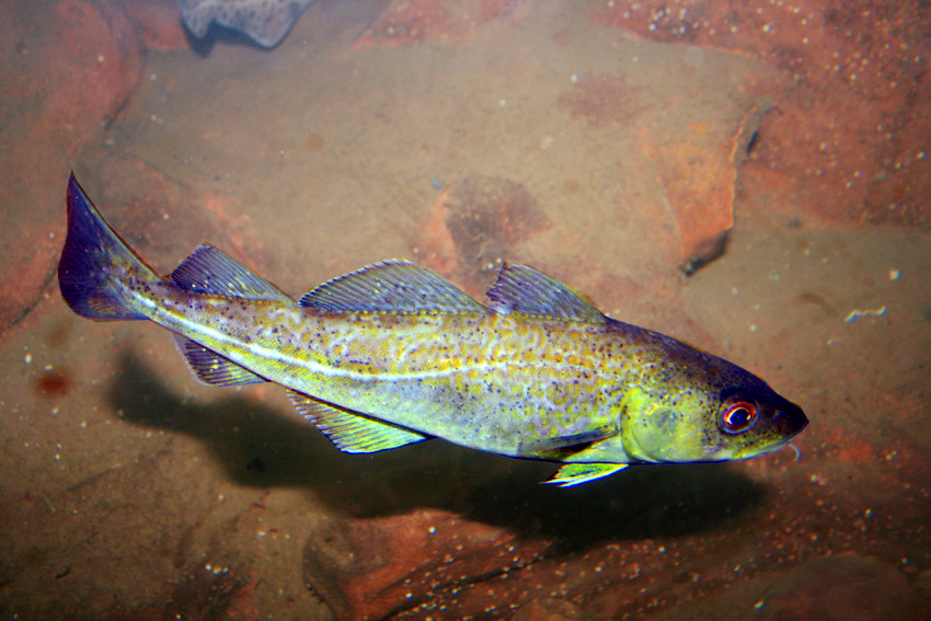 Cod